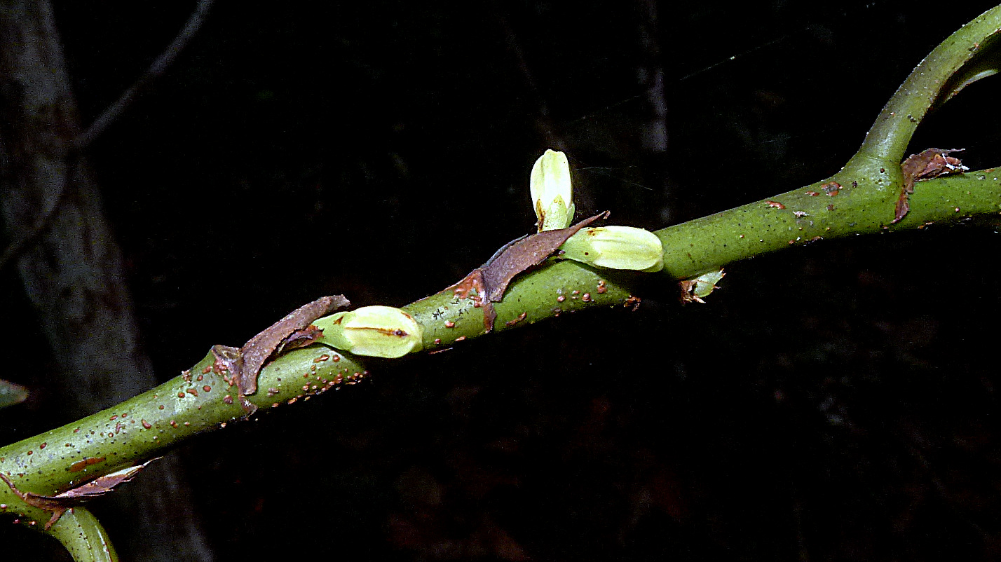 Erythroxylum martii Peyr.